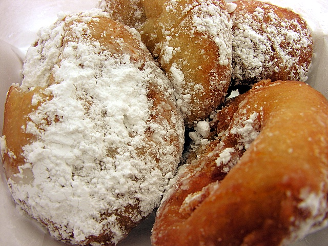 Zepone (Zeppole)